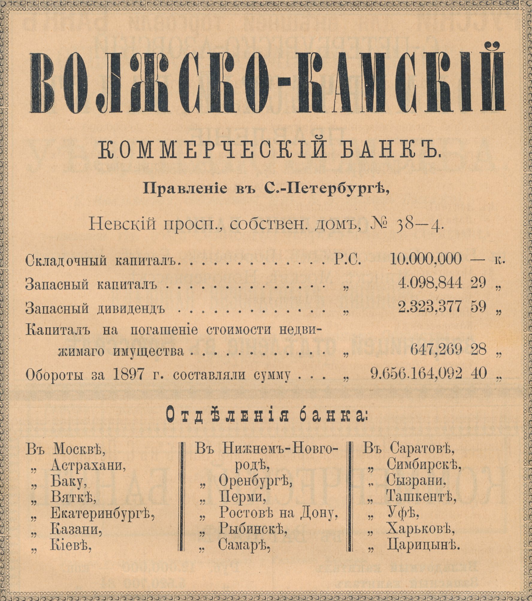 Реклама Волжско-Камского коммерческого банка, 1899 год.